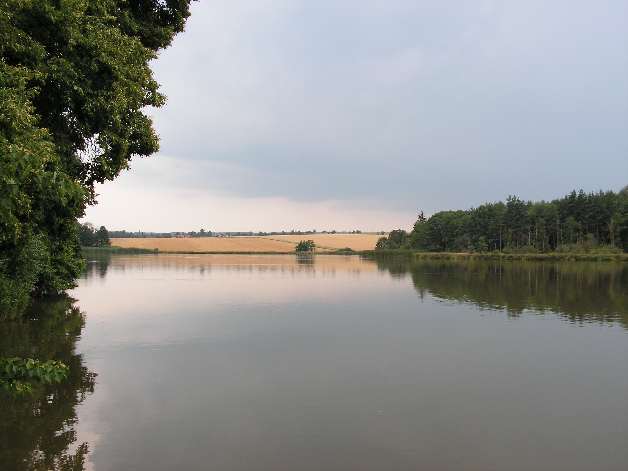 Kunický rybník nacházející se severozápadně od Leštiny u Světlé v okrese Havlíčkův Brod. Na pozadí snímku je vidět část osady Dobrnice.